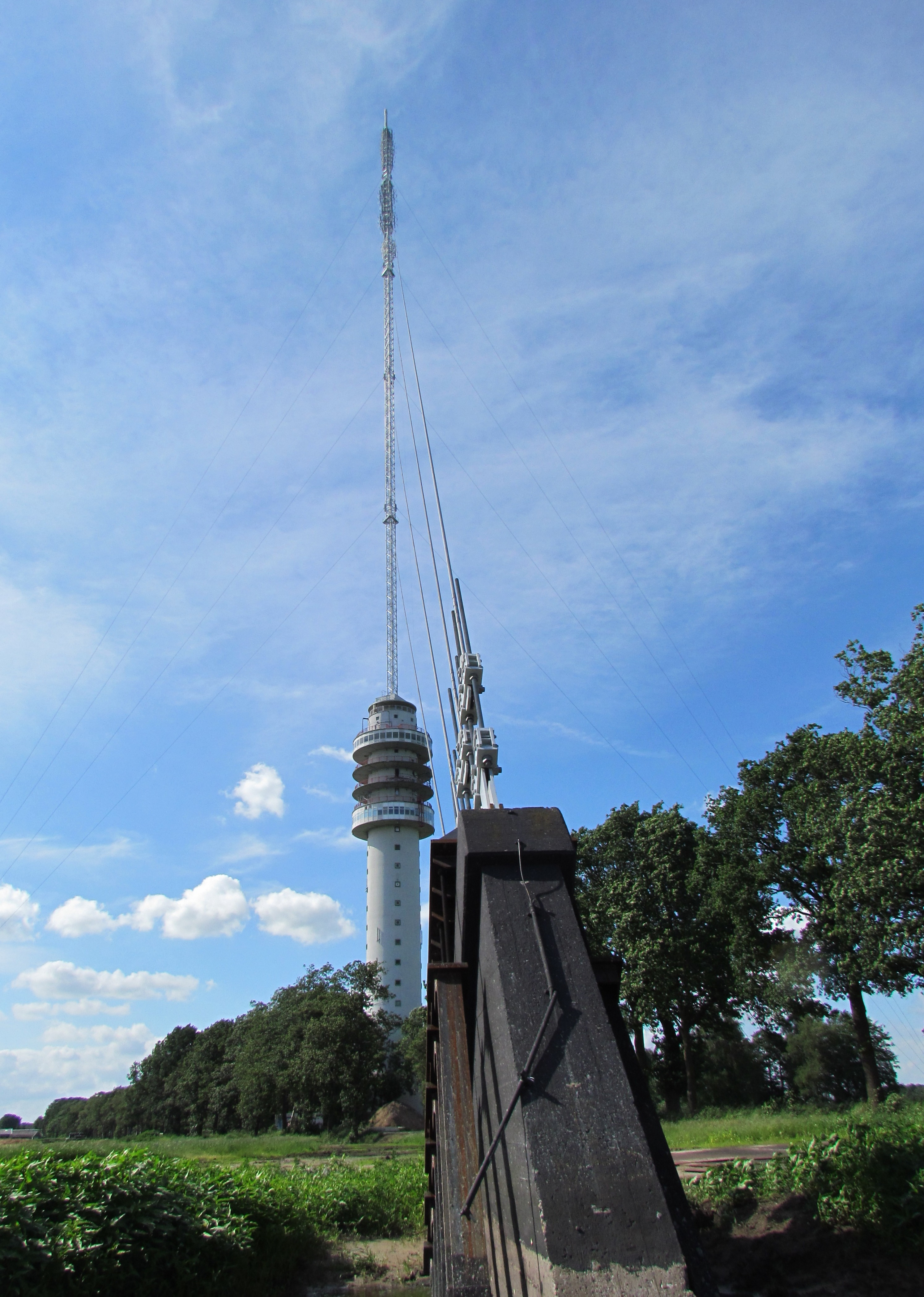 Zendstation Smilde in juni 2012, na het bereiken van het hoogste punt (14 mei) bij de herbouw van de mast, waarvan het stalen gedeelte op 15 juli 2011 instortte. Genomen vanaf een van de ankerpunten van de tuikabels